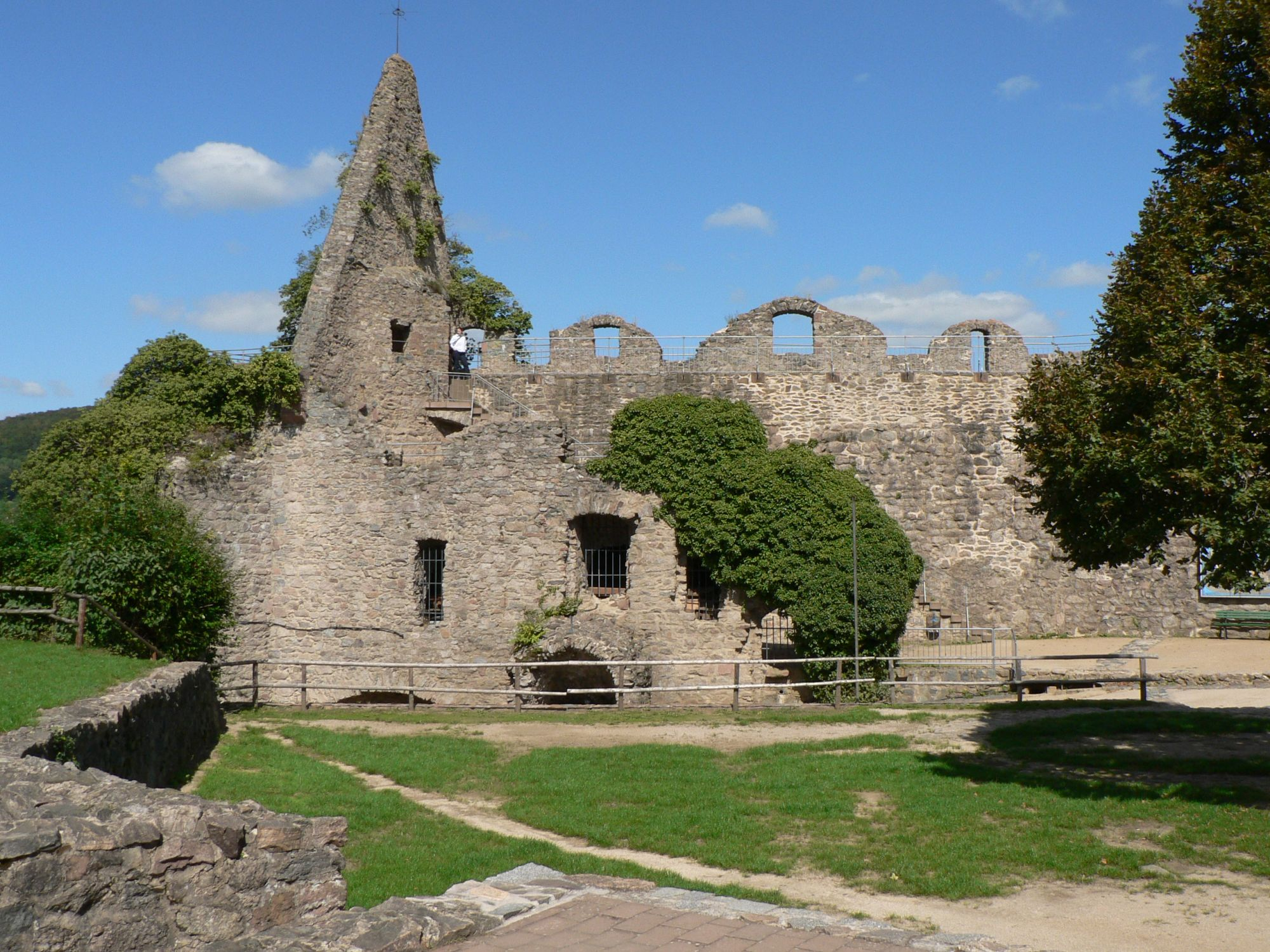 Ehemaliger Wohnbau von Burg Lindenfels